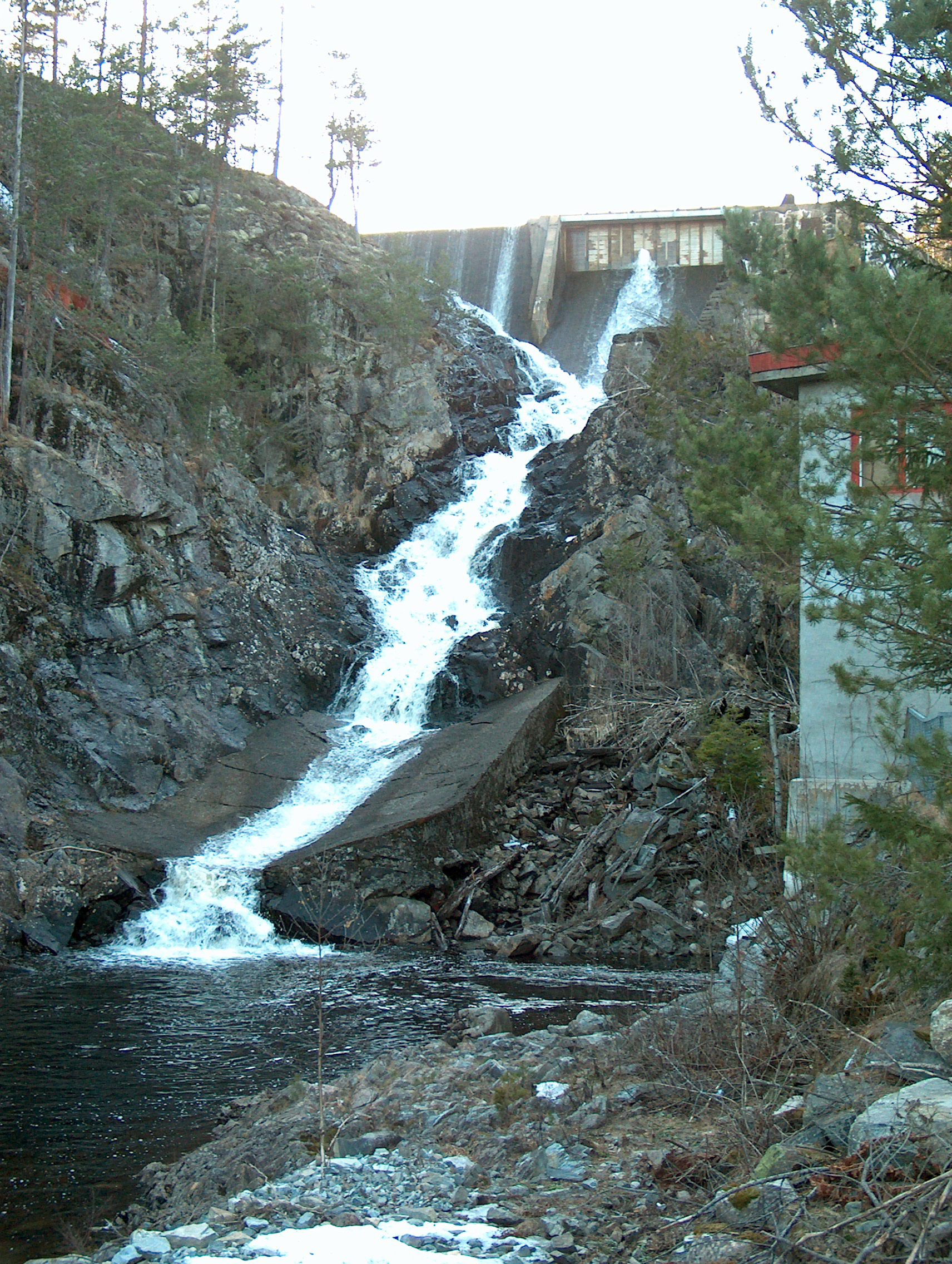 Gjuvfossen ved utløpet av Langvannet (Langvassdammen)